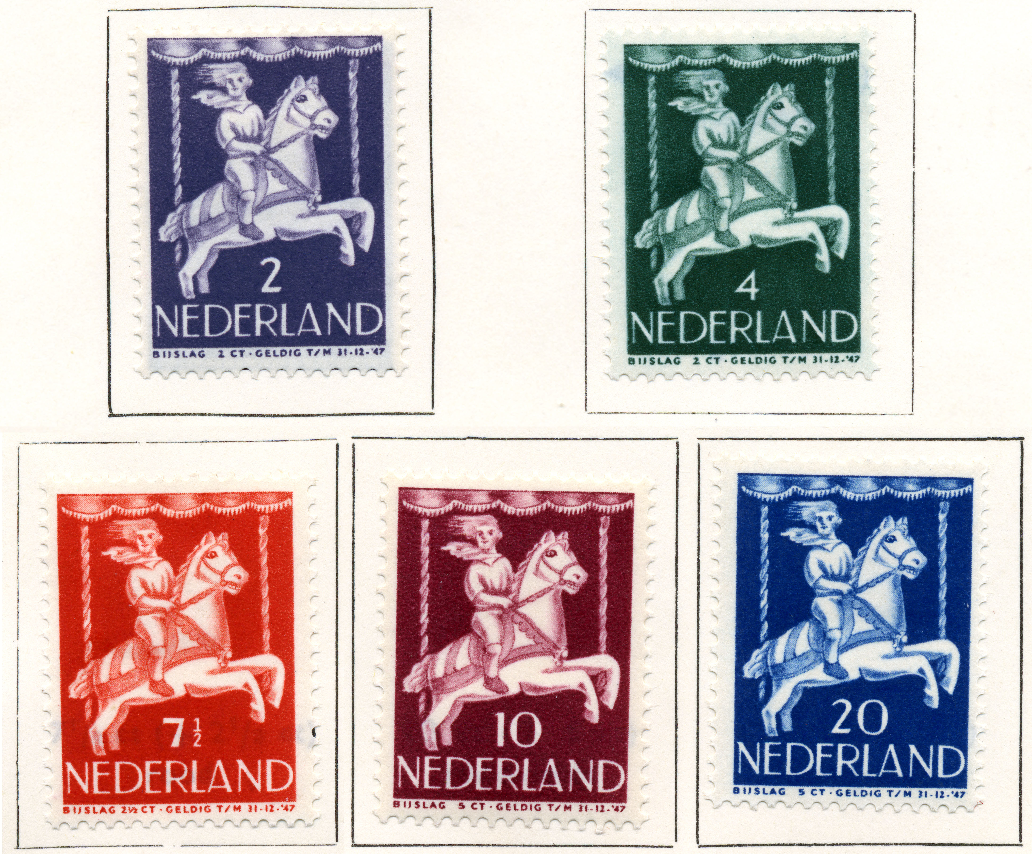 1946 Kinderzegels. Kind te paard in draaimolen. NVPH nr 469-473. Ontwerp Mej. A.J.W. Bieruma Oosting